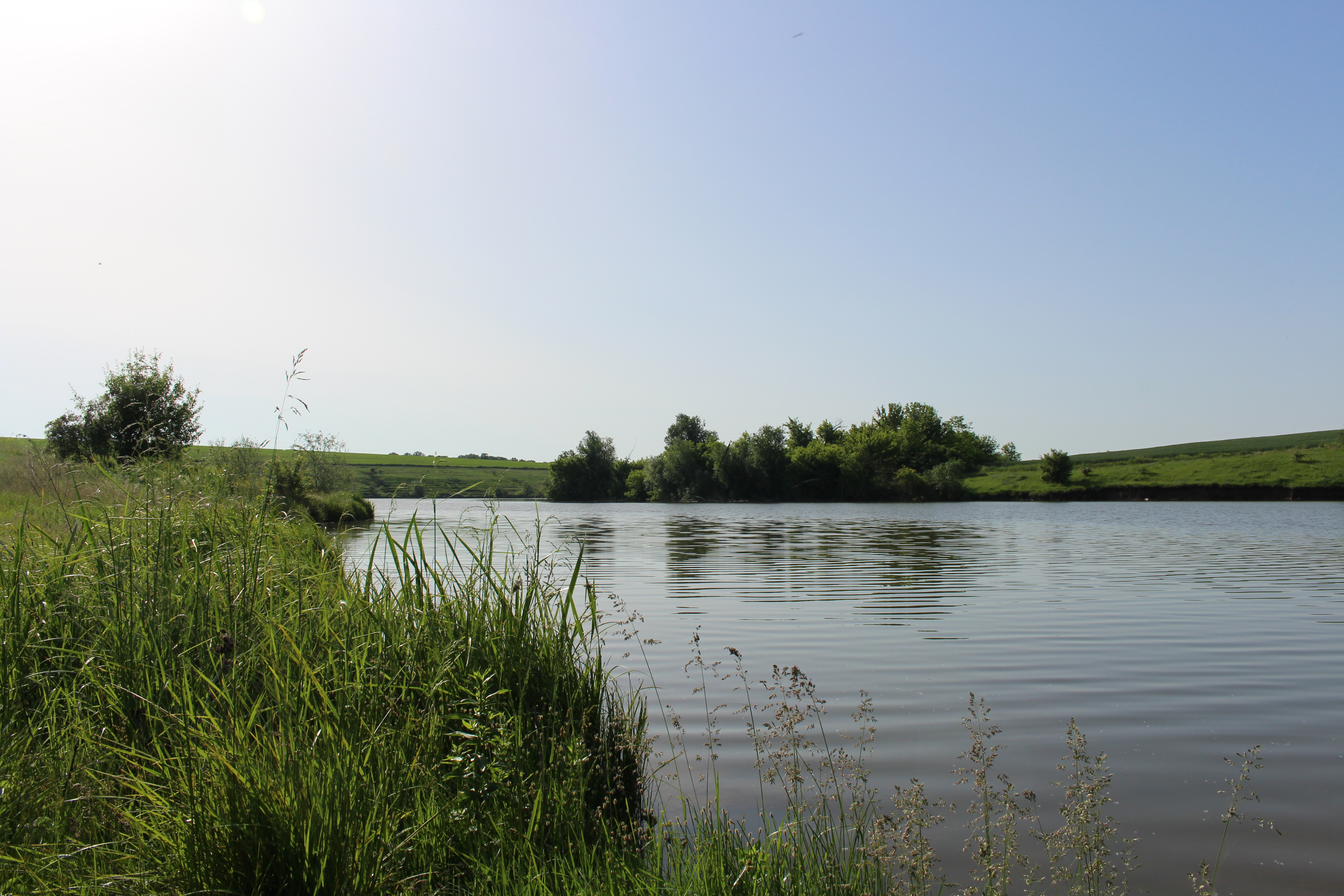 Спокійний Кільтен, дно якого скалисте і дуже зручне для купання. На протилежному березі знаходяться гніздечка горобців.